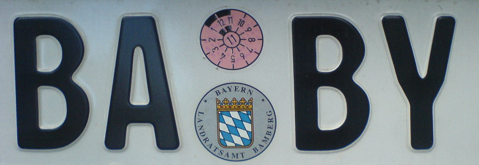 BA-BY (German license plate)